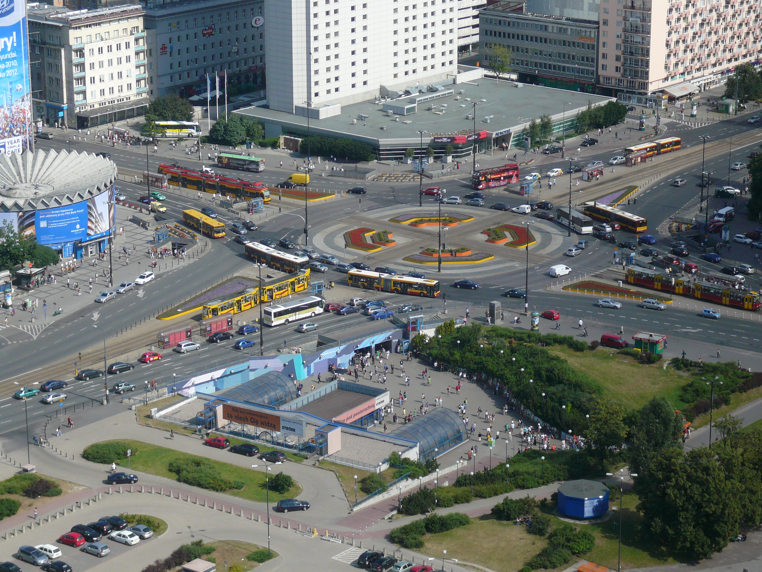 Rondo Romana Dmowskiego w Warszawie